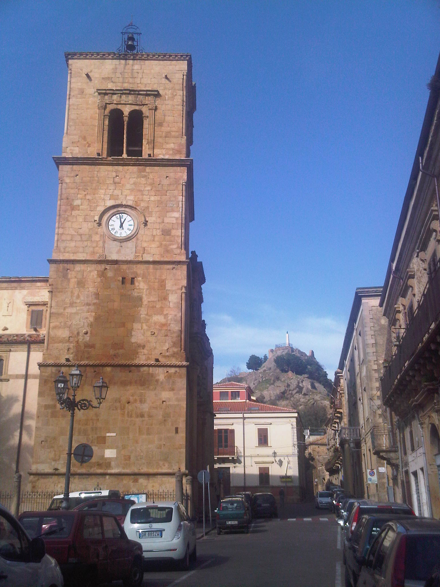 Centro storico di Mistretta, Sicily